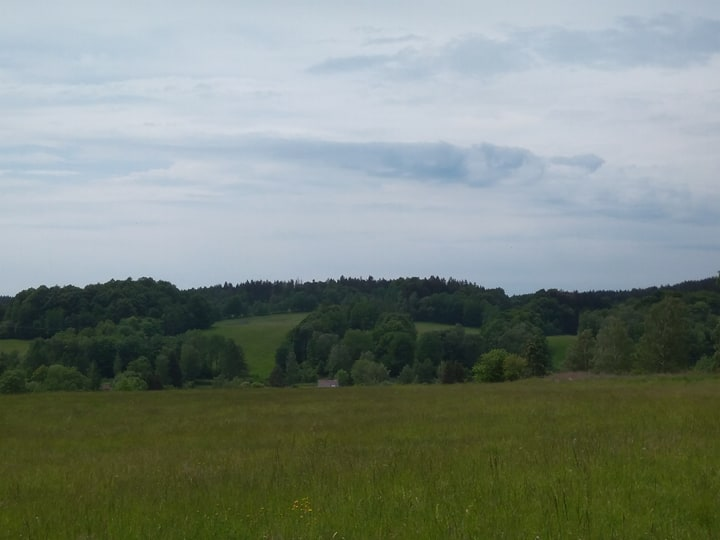 Davidův vrch v Mikulášovicích, pohled z Kostelní stezky